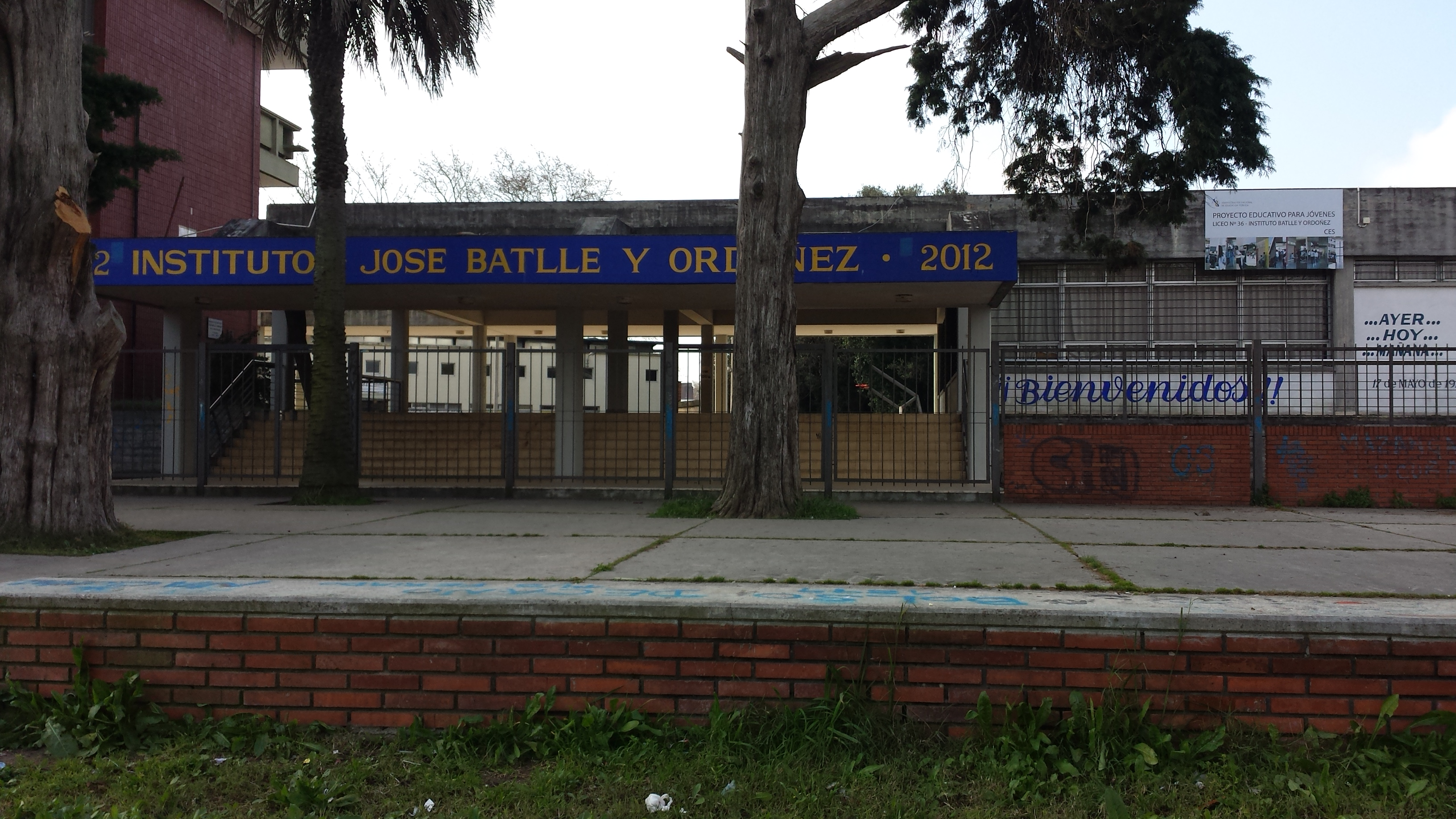 Liceo Instituto Batlle y Ordóñez, Montevideo, Uruguay